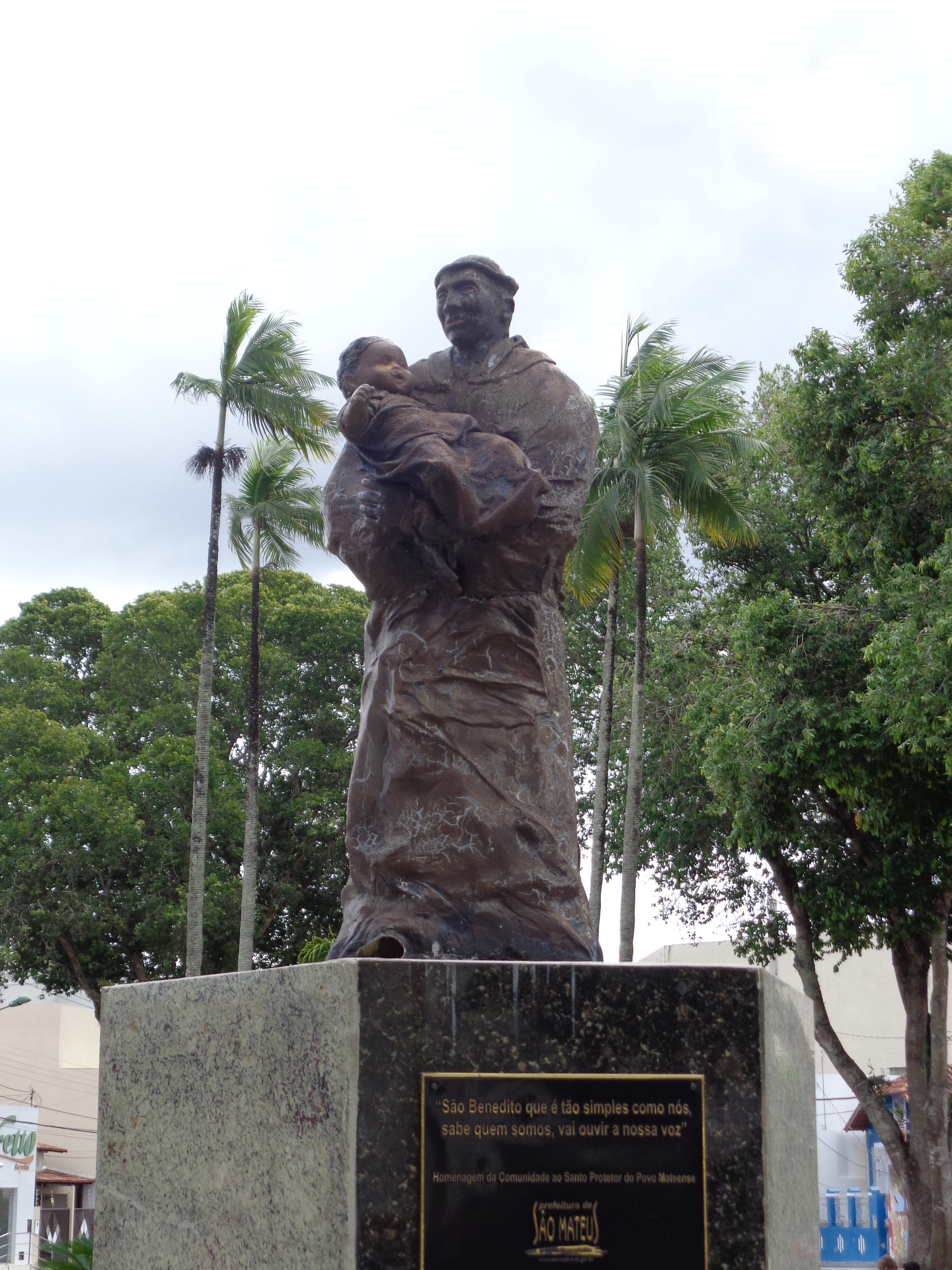 Português do Brasil: Estátua de São Benedito em São Mateus-ES Obra do Artista Plástico Marcelo Pimentel